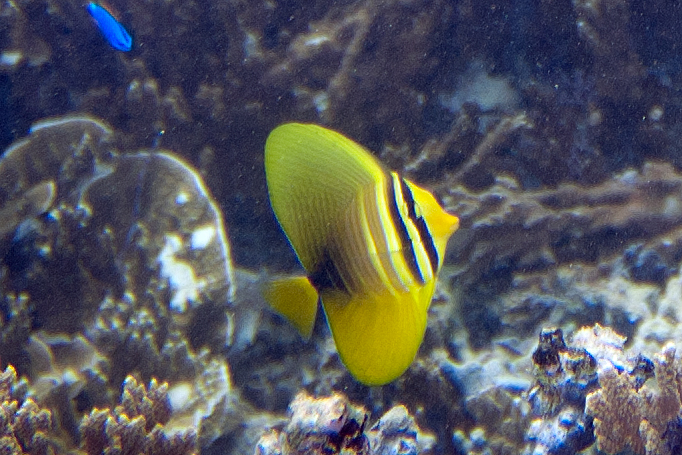 juvenile sailfin tang Zebrasoma veliferum